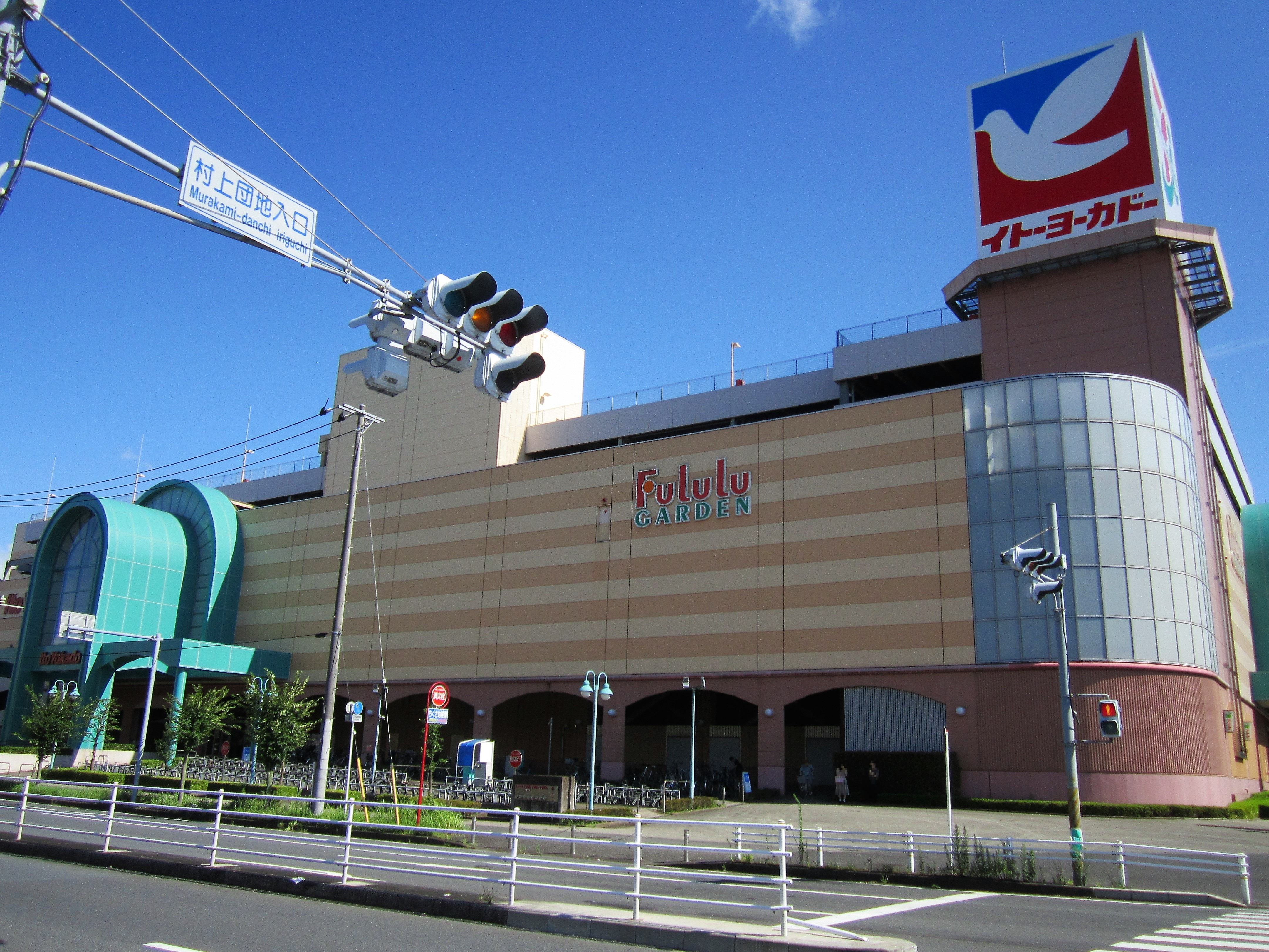 フルルガーデン八千代・イトーヨーカ堂八千代店（八千代市村上南）